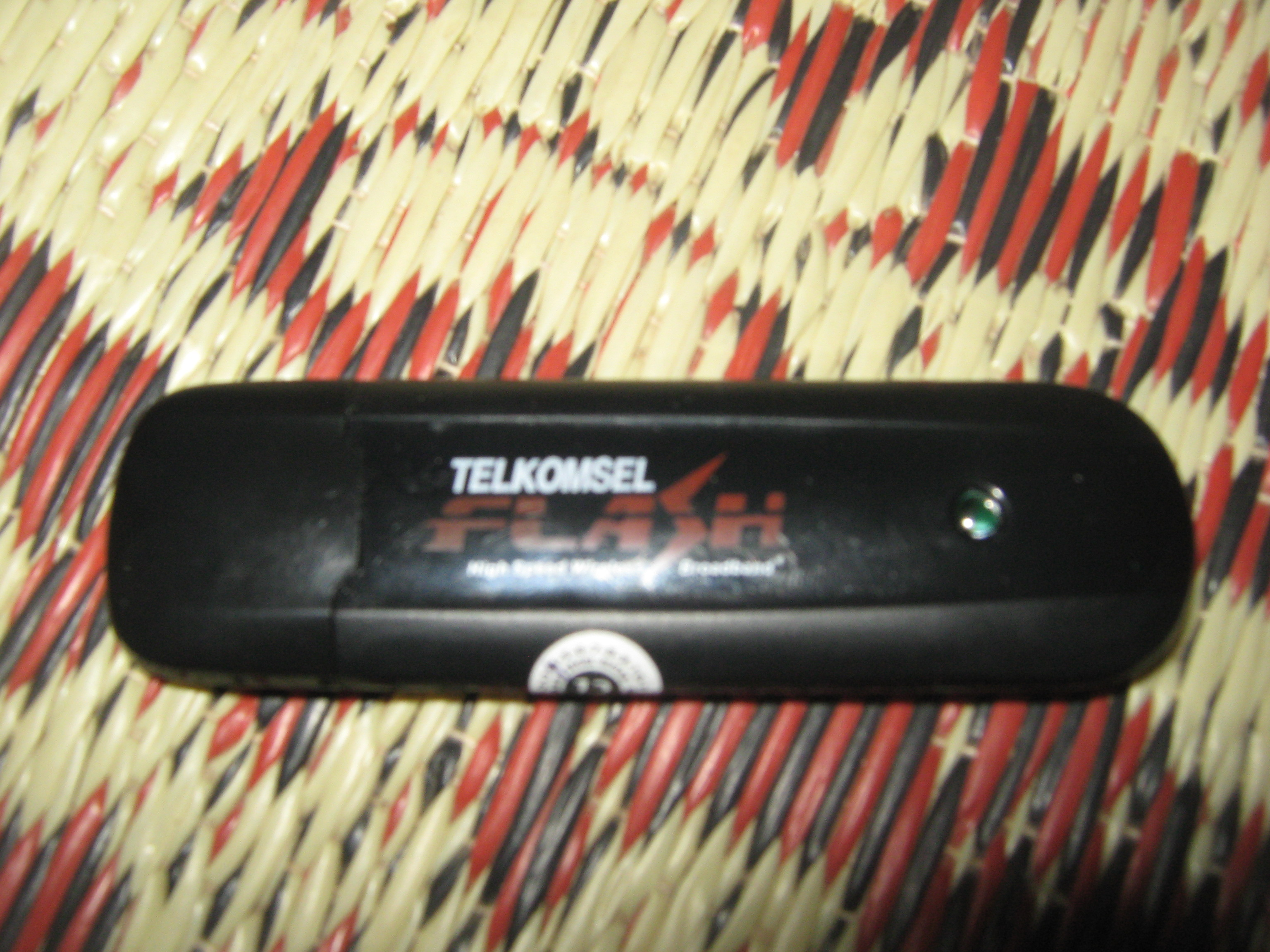 Basa Jawa: Modem GSM